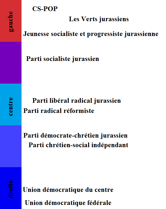 définitif, suggestions ?